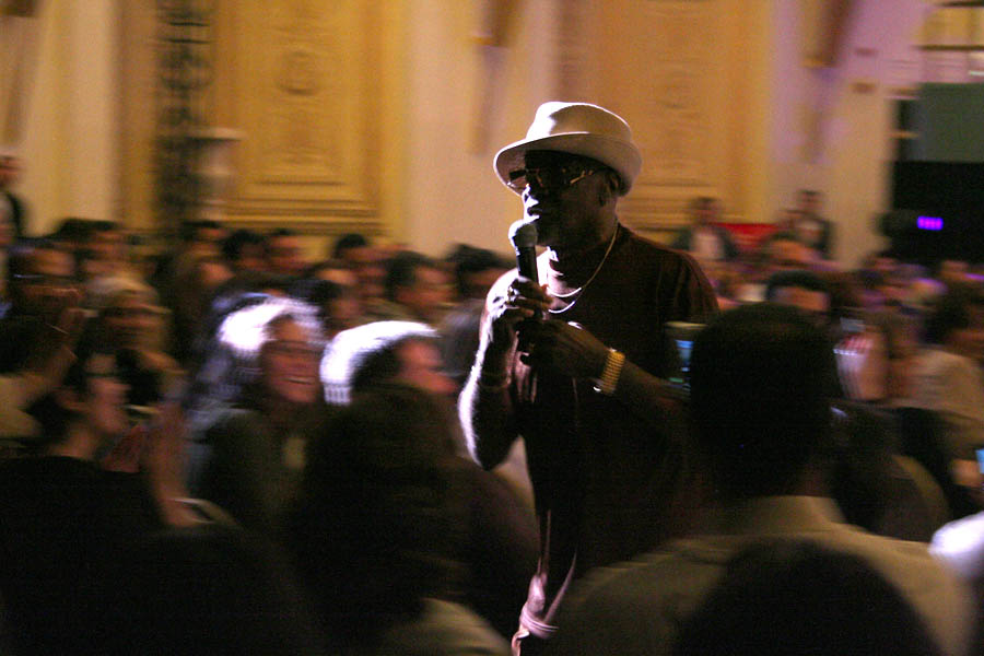 Billy Paul en concert au Carthage Palace à Tunis, Tunisie, le 14/04/2006